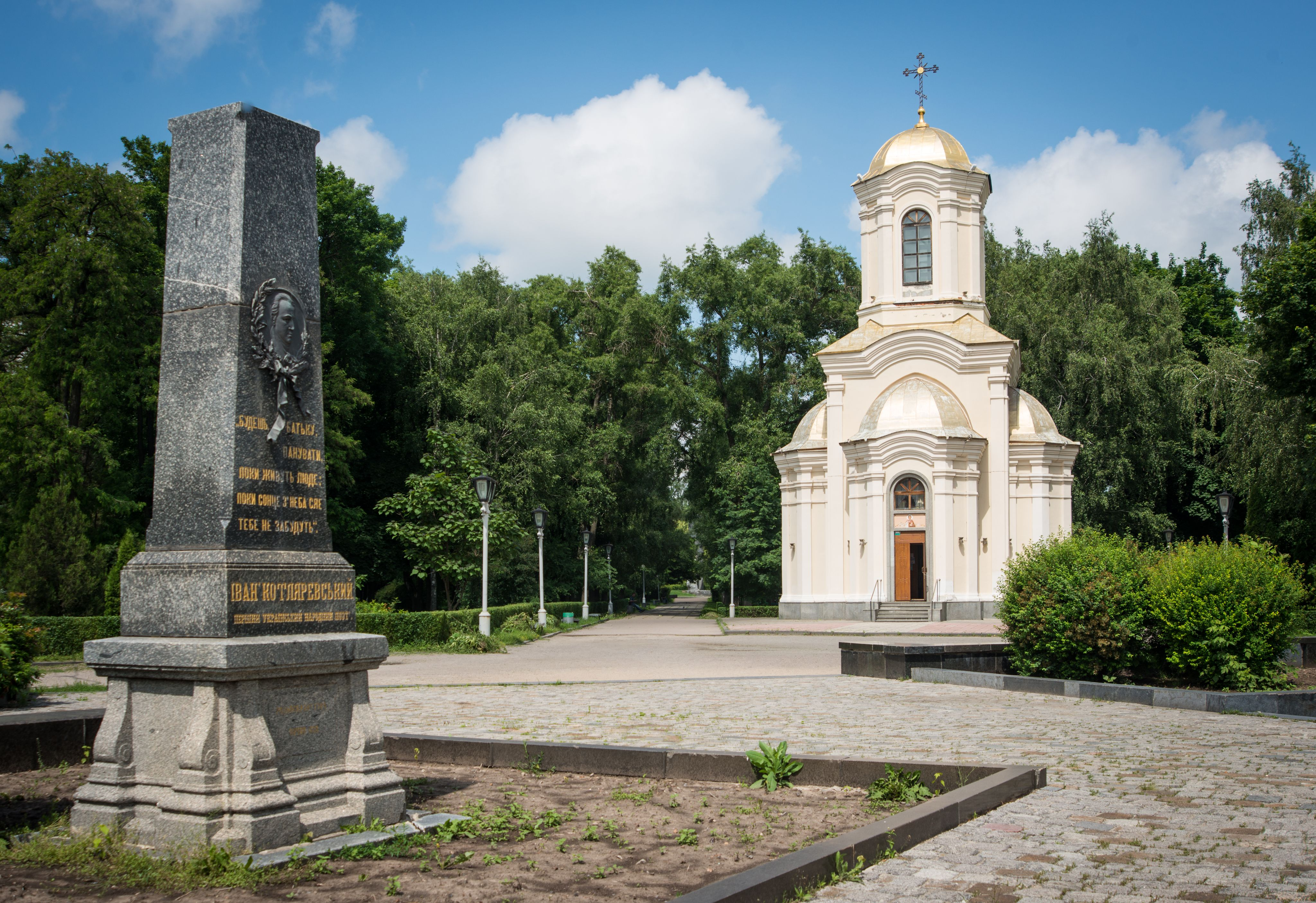 Могила письменника І. П. Котляревського, Полтава, парк імені І. Котляревського